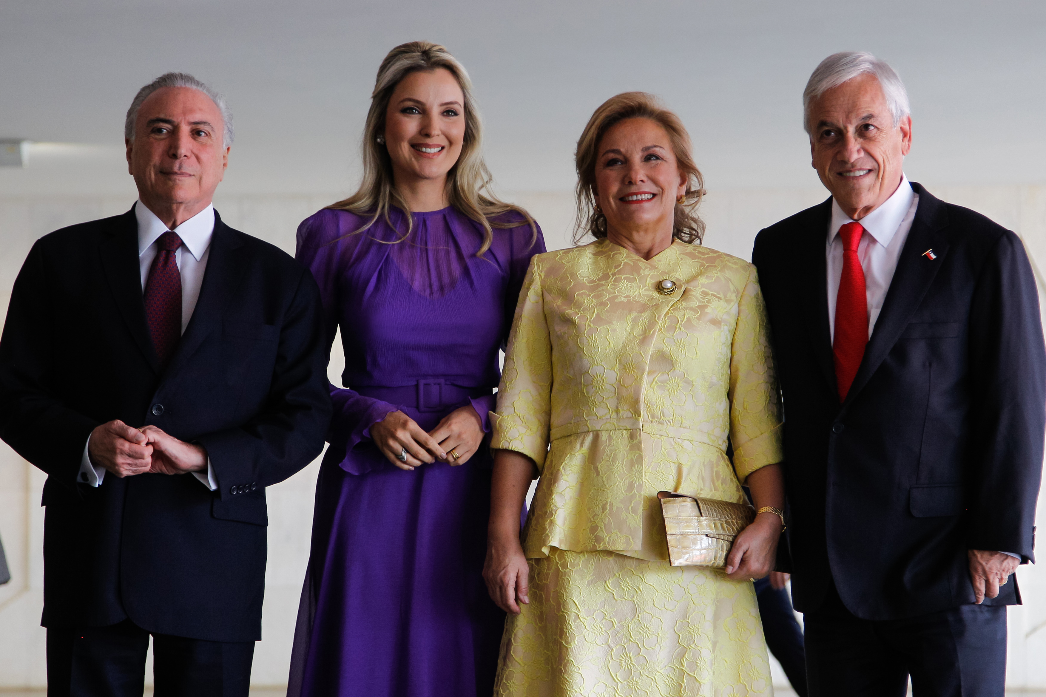 (Brasília - DF, 27/04/2018) Almoço oferecido pelo Senhor Presidente da República e pela Primeira Dama ao Senhor Sebastián Piñera, Presidente da República do Chile, e à Senhora Cecilia Morel, Primeira Dama da República do Chile.Foto: Marcos Corrêa/PR